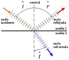 reflexion